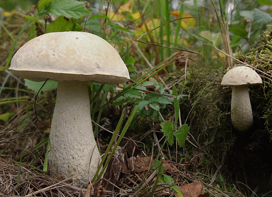 Valge puravik